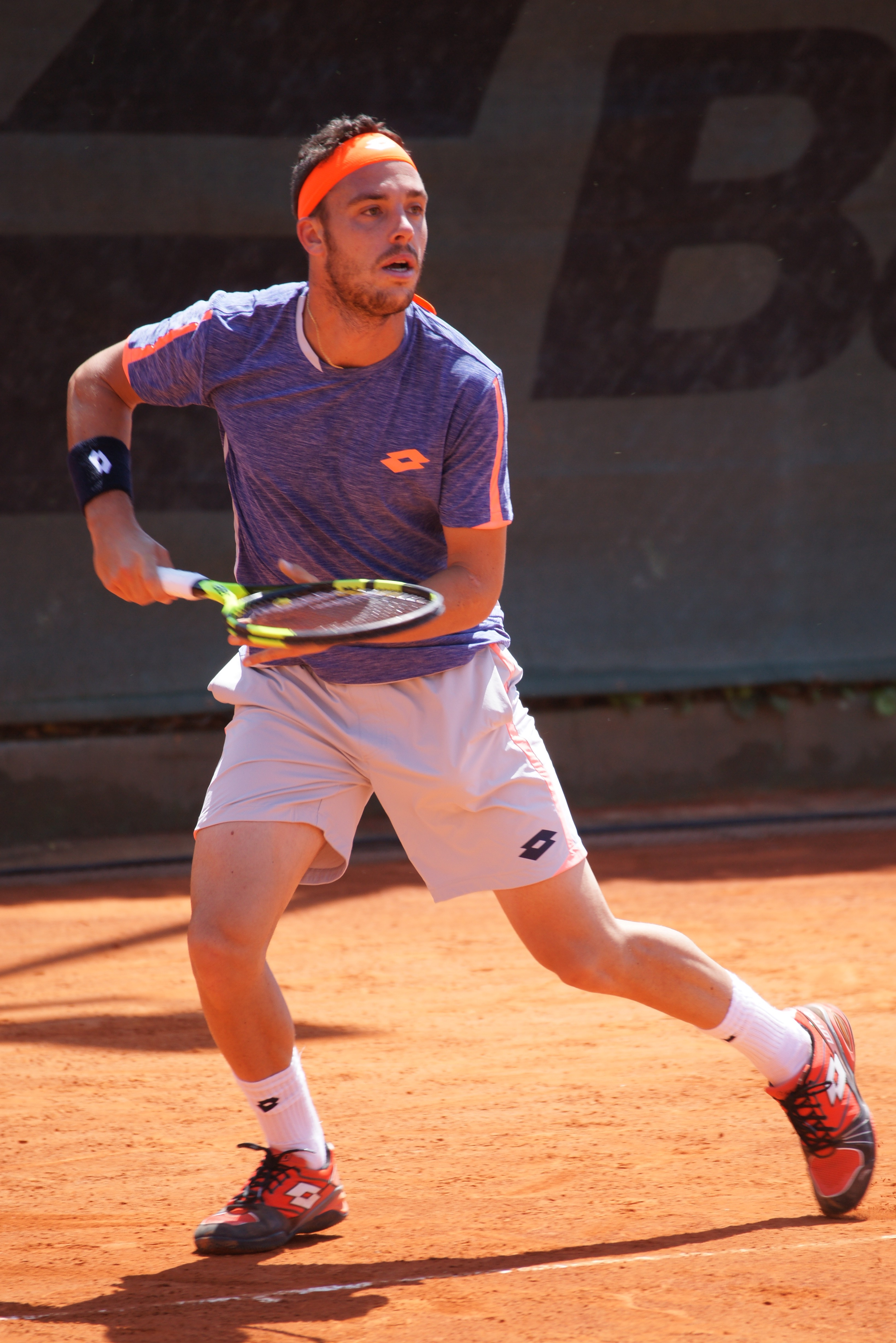 Marco Cecchinato Nice ATP 2016